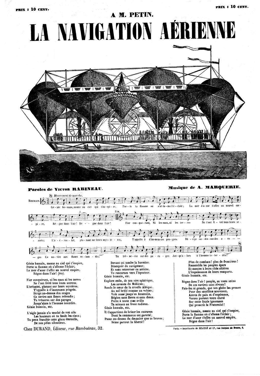 Une chanson du goguettier Victor Rabineau, éditée par Charles Durand à Paris, imprimerie de Beaulé, dédiée à M. Petin. La notice de la BNF indique 1859 comme date d'édition, contredisant le tampon apposé à l'époque du dépôt de l’œuvre, qui indique 1851.